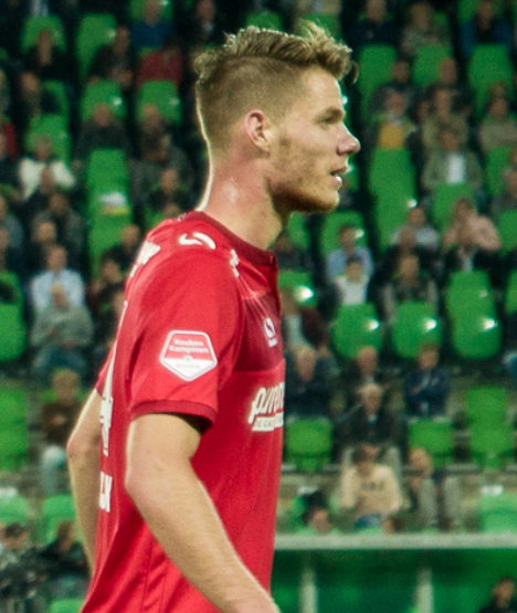 Jari Oosterwijk, Nederlands voetballer, spelend voor FC Twente in een wedstrijd tegen FC Groningen (2018)